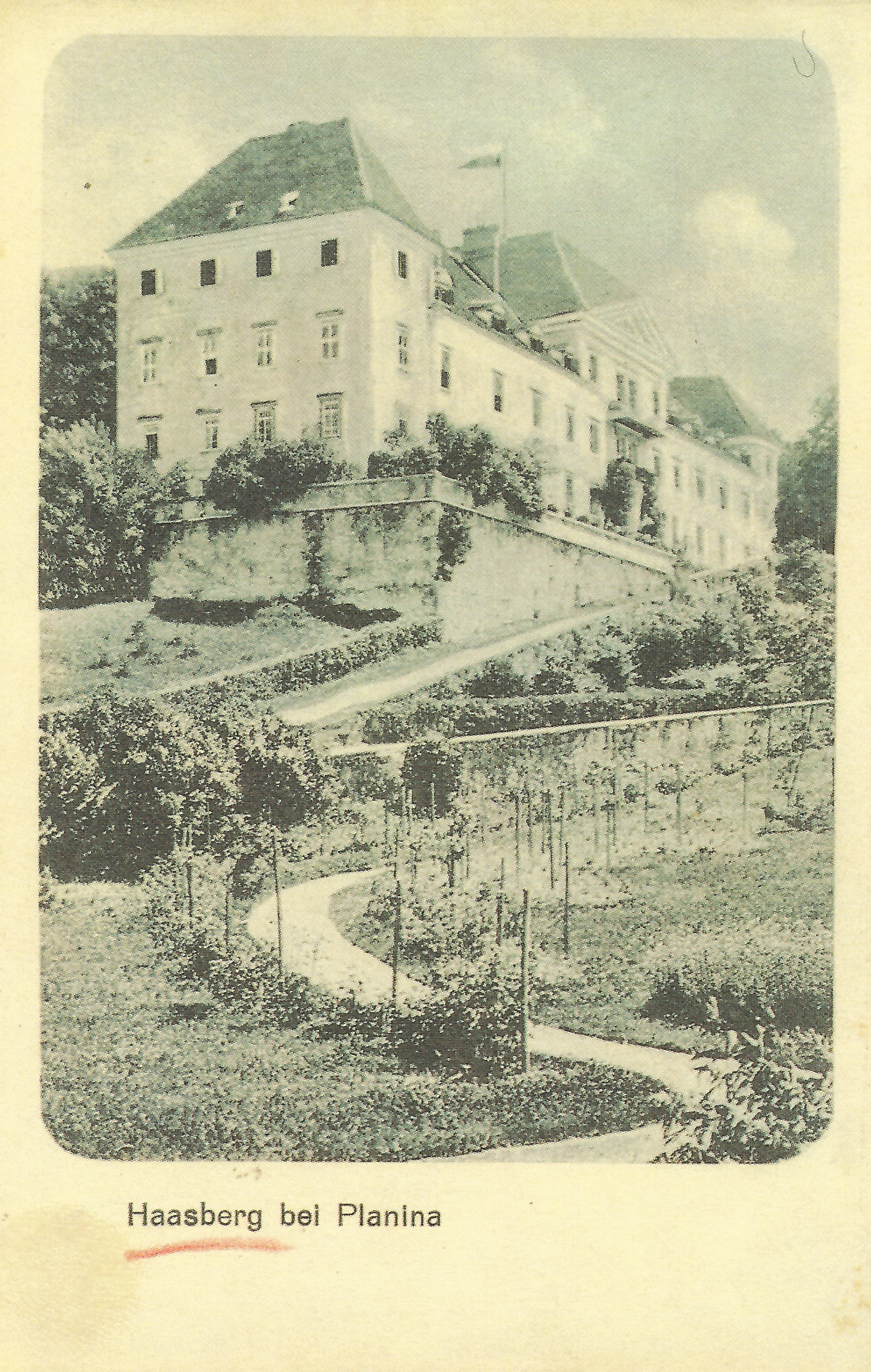 Razglednica dvorca Hošperk.